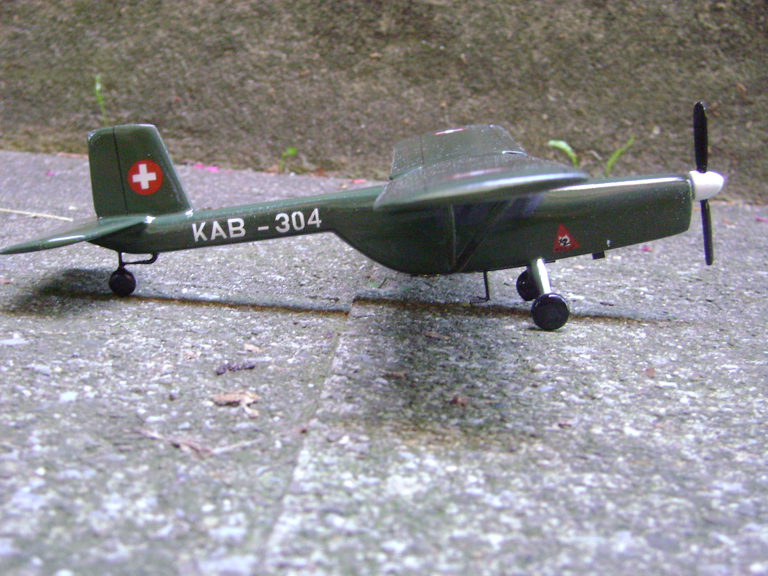 Pilatus P-5 Projekt Kampfzonen und Artillerie Beobachtungsflugzeug (KAB)